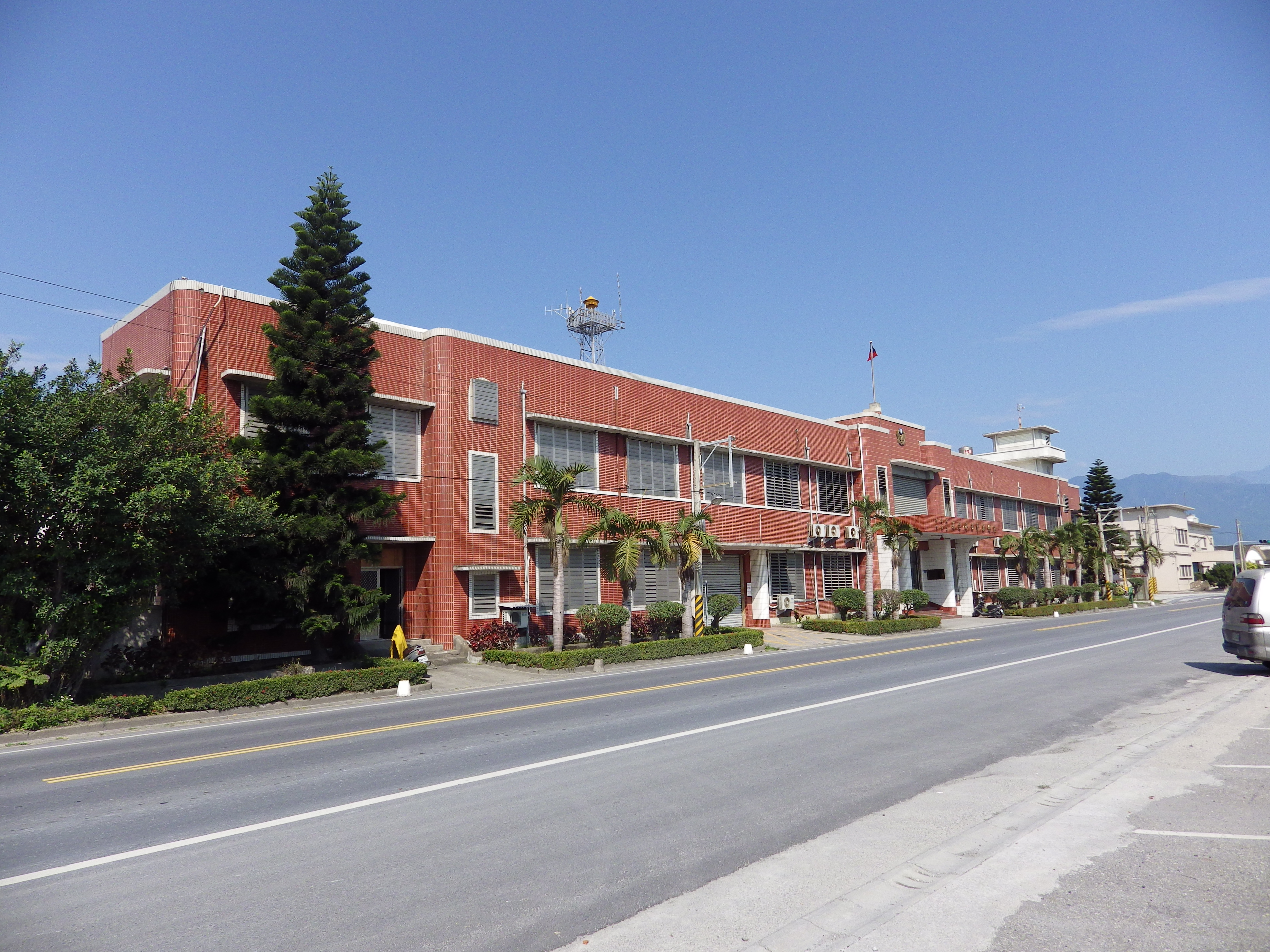 花蓮港埠頭合同廳舍外觀